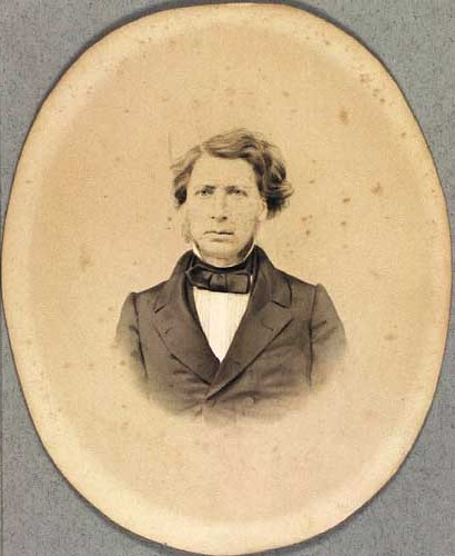 Carl Peter Frederik Drejer (1808-1871), Danish farmer and politician, MP